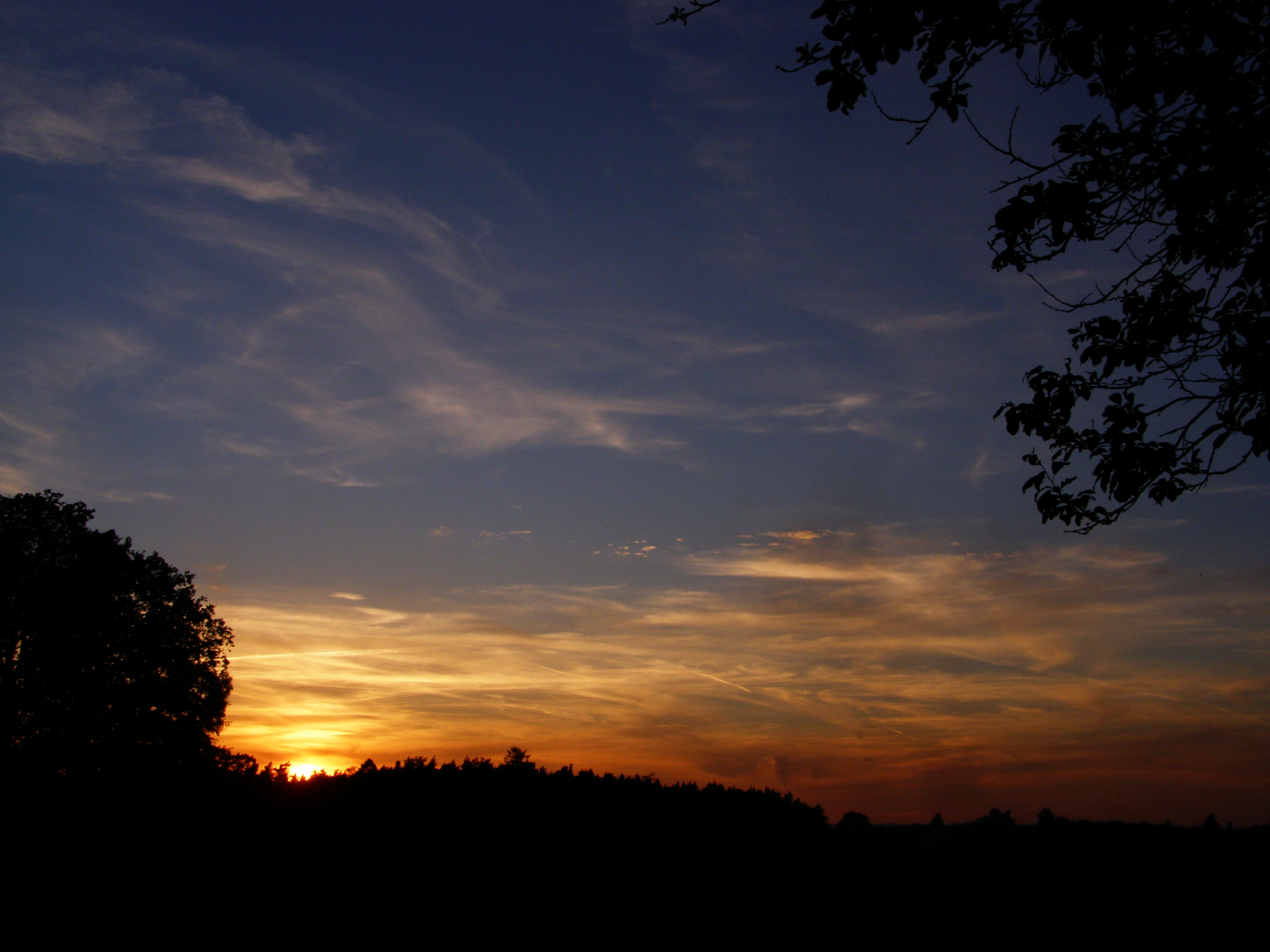 Pertoltice, lokalita Nové Pertoltice, západ slunce